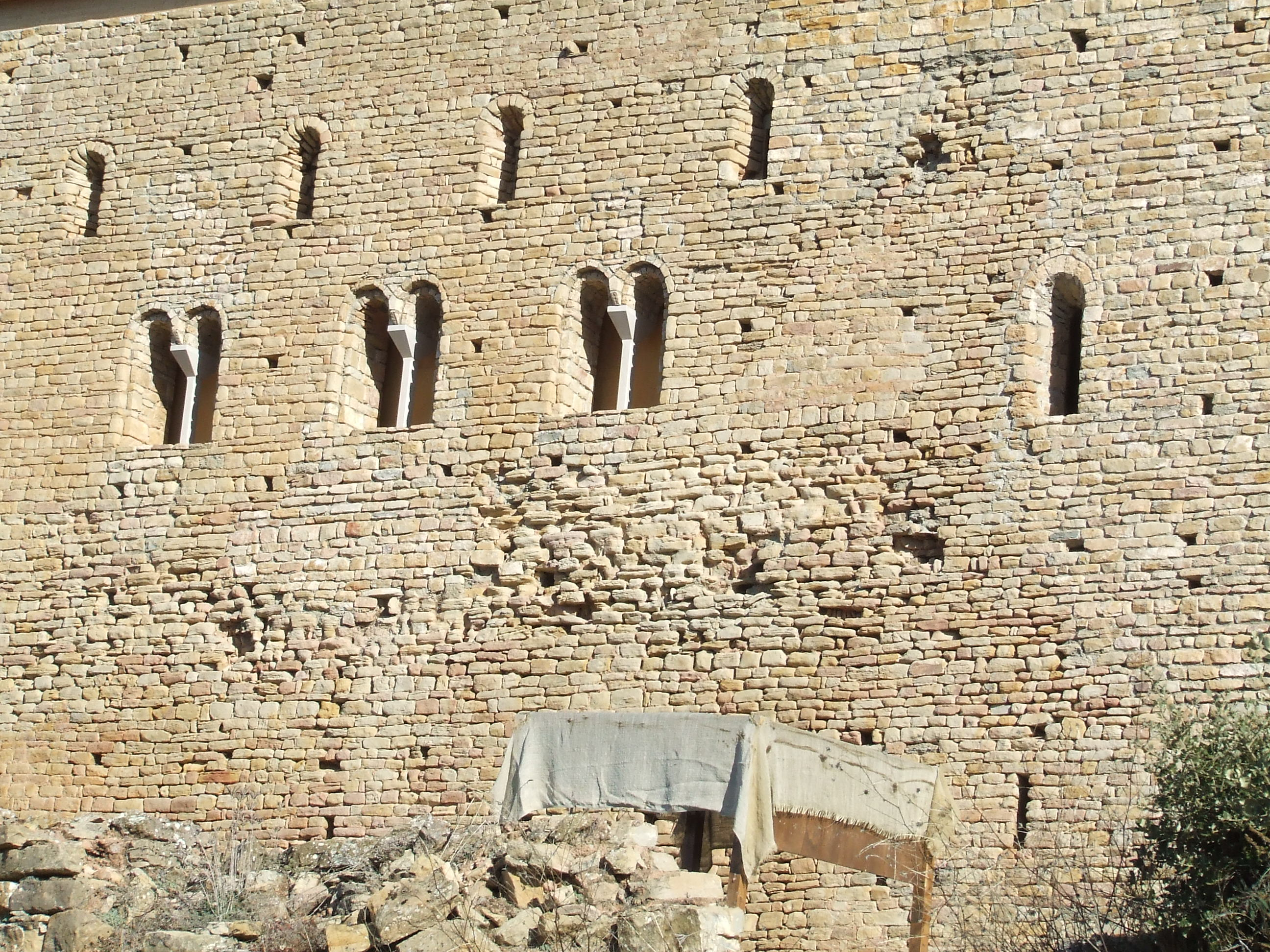 Detall del cos principal del castell de Llordà (Llordà, Isona i Conca Dellà, Pallars Jussà)